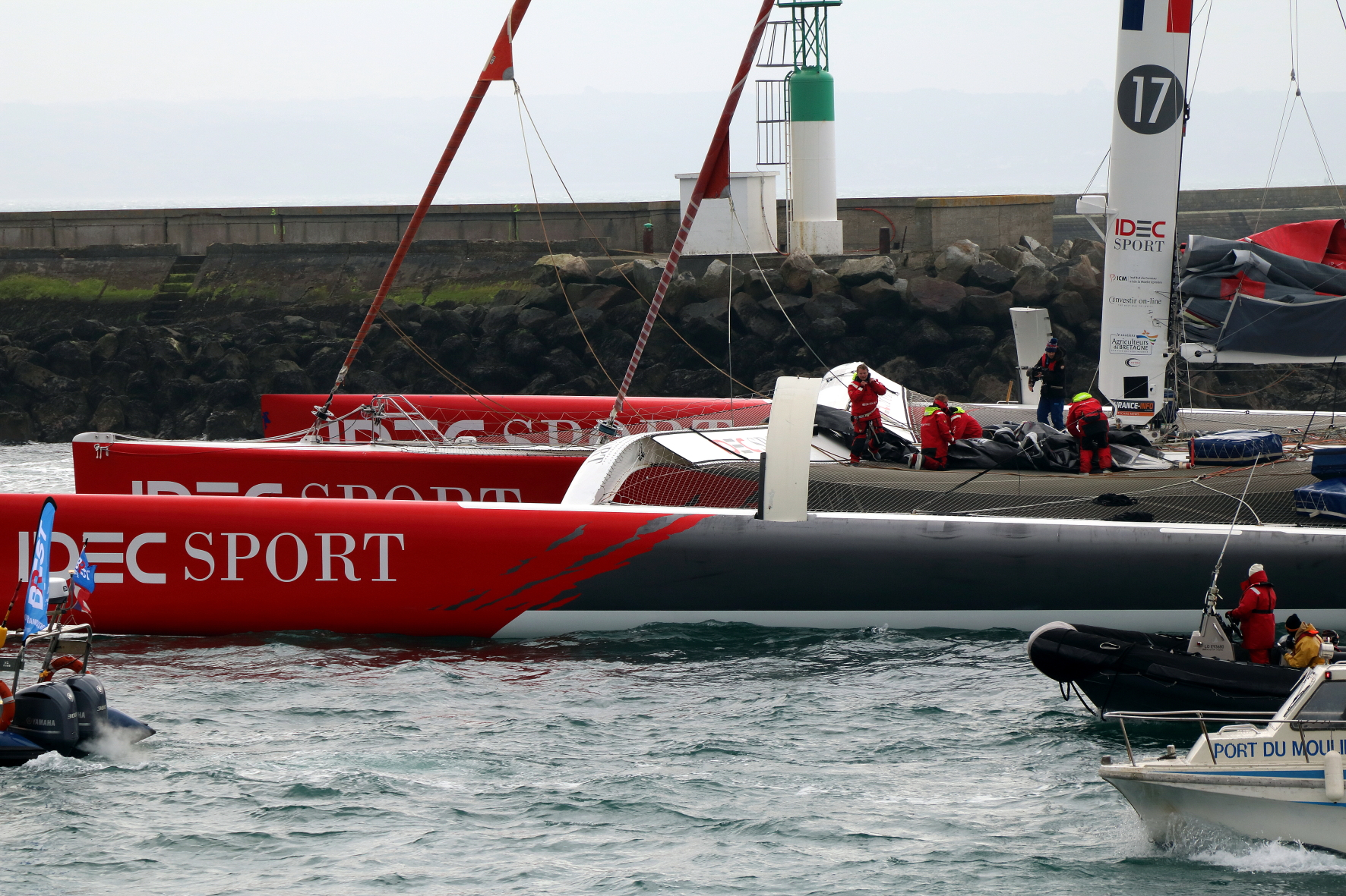 Arrivée de Francis Joyon et de l'équipage du maxi trimaran Idec Sport à Brest après leur record en 40 jours autour du monde, le 26 janvier 2017.